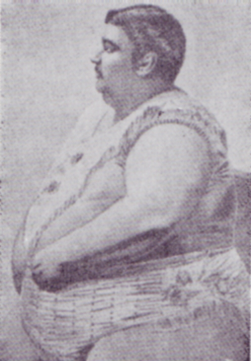 Emil Naucke, Ringer und Artist. Foto vor 1900.